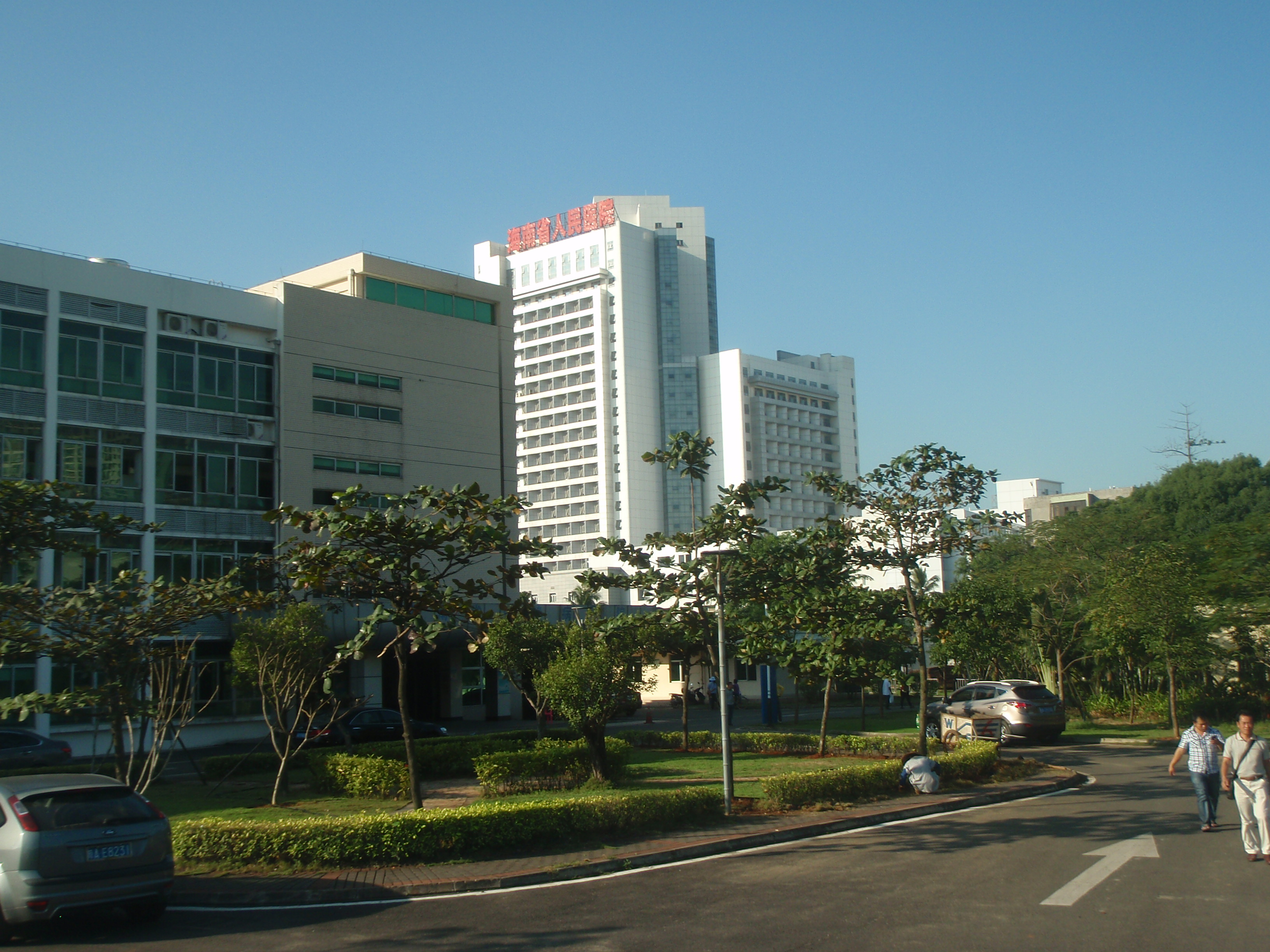 海南省人民医院